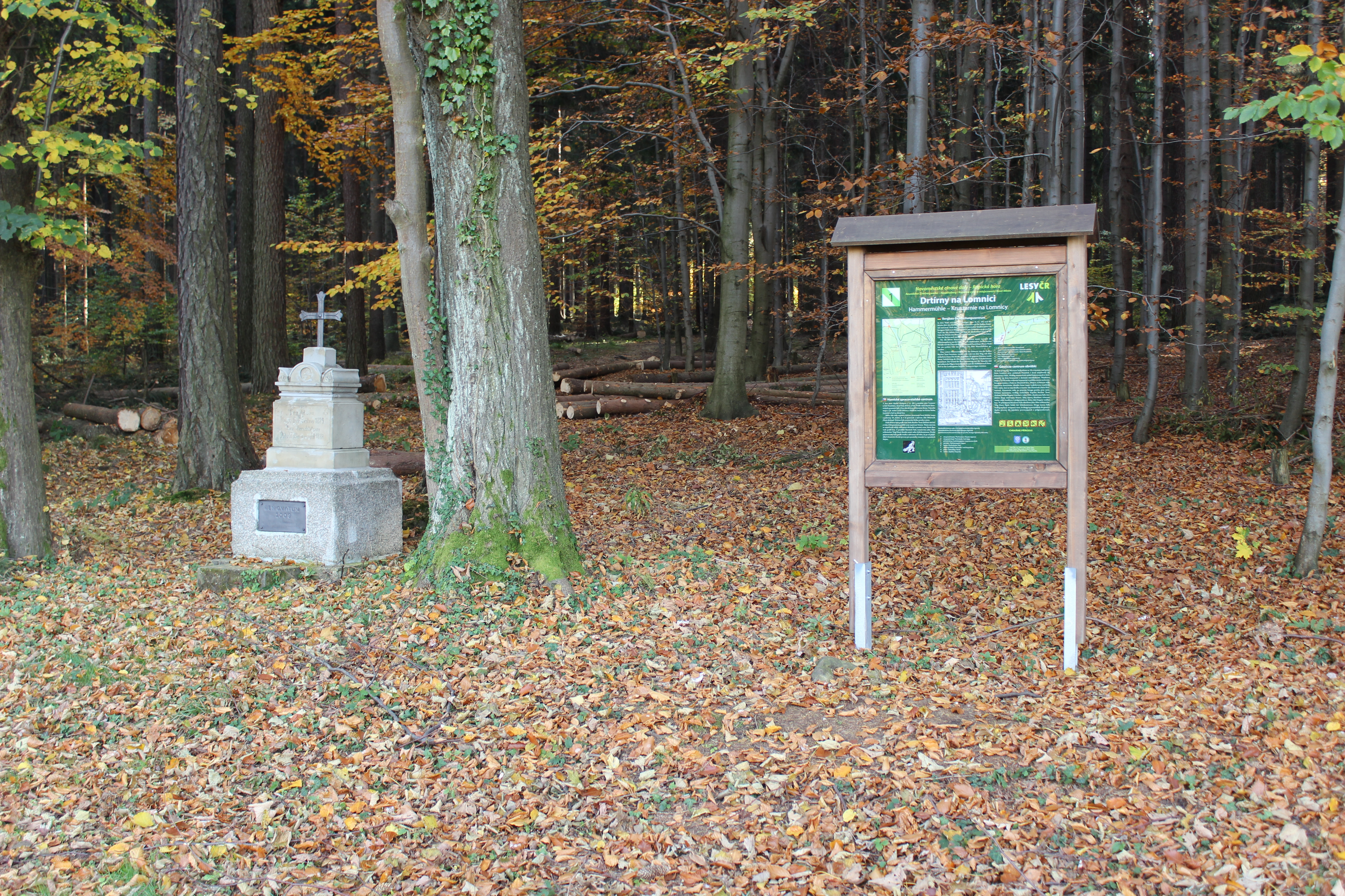 První zastavení naučné stezky Novoměstské cínové doly – Rapická hora nazvané Drtírny na Lomnici.